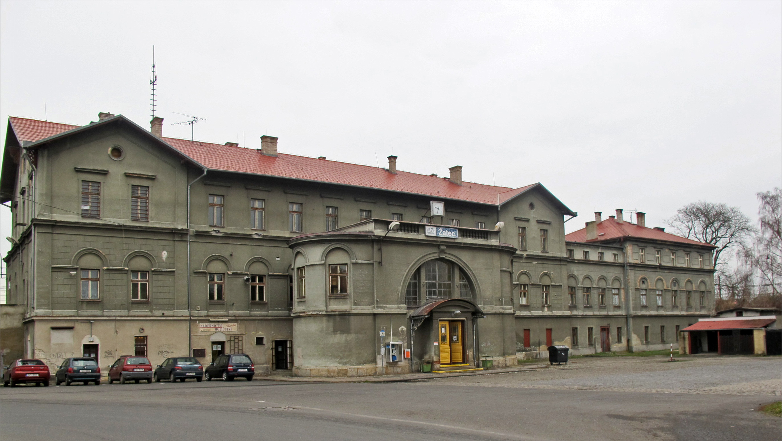 Hlavní nádraží v Žatci